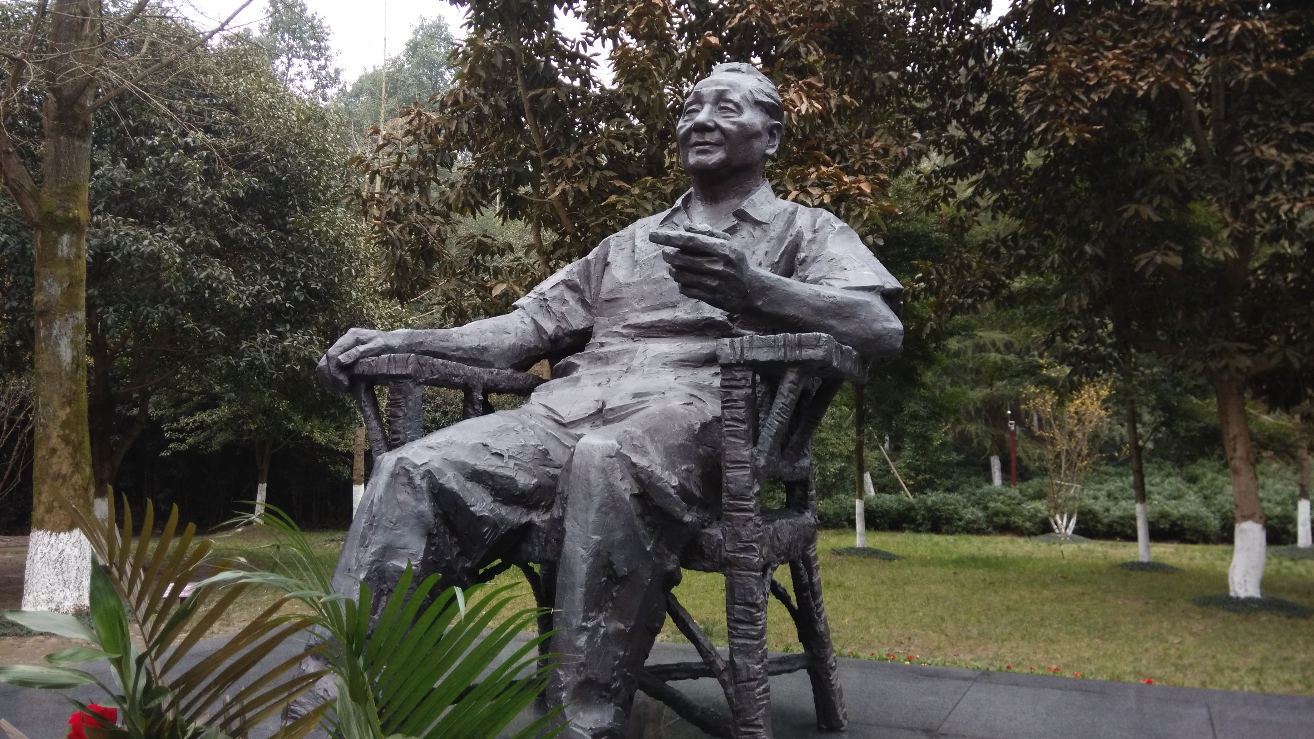 Deng Xiaoping, Statue (sitzend) im Park zu seinen Ehren an seinem Geburtsort